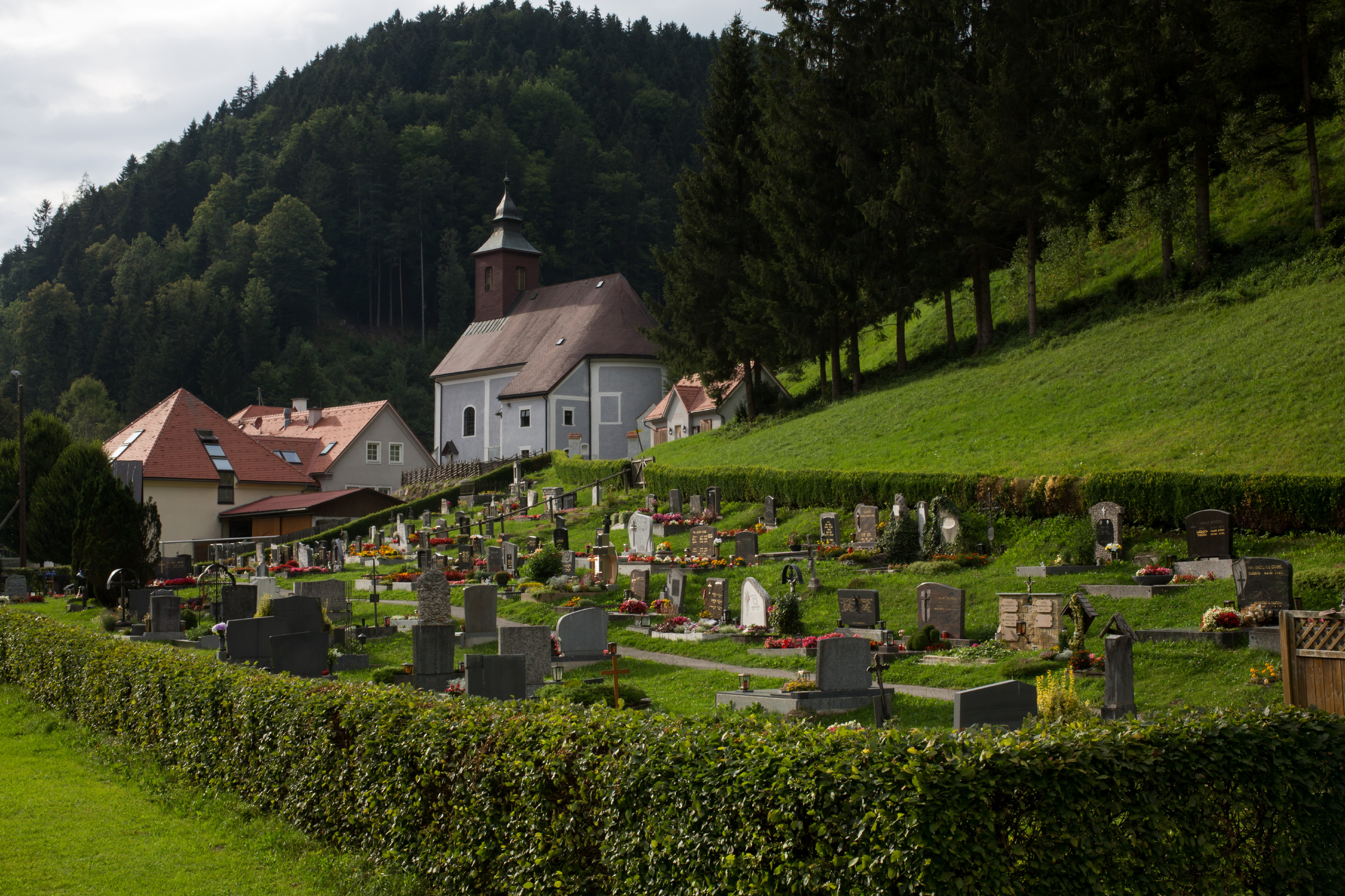 Friedhof in Arzberg, im Hintergrund die Jakobuskirche. Steiermark